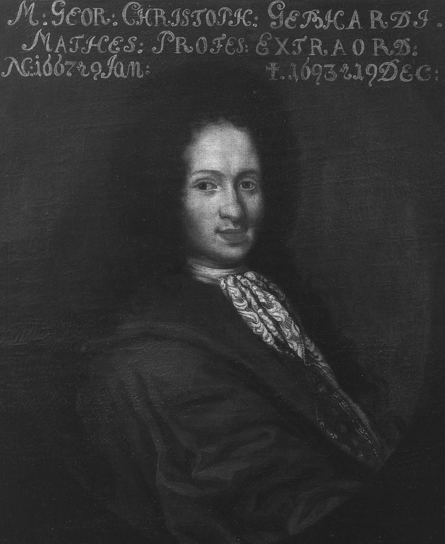 Bildnis Georg Christoph Gebhardi (1667–1693)